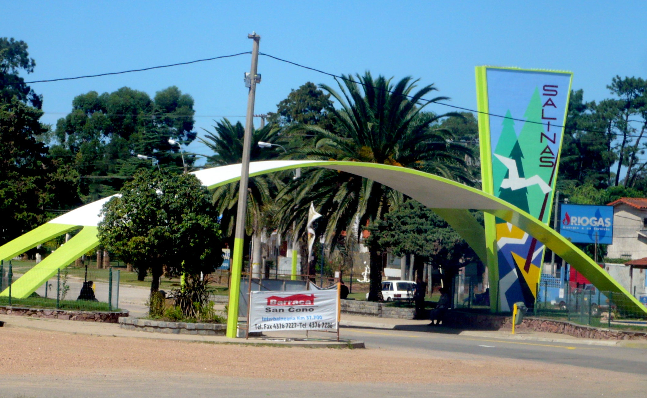 El arco luego de la remodelacion, Uruguay.